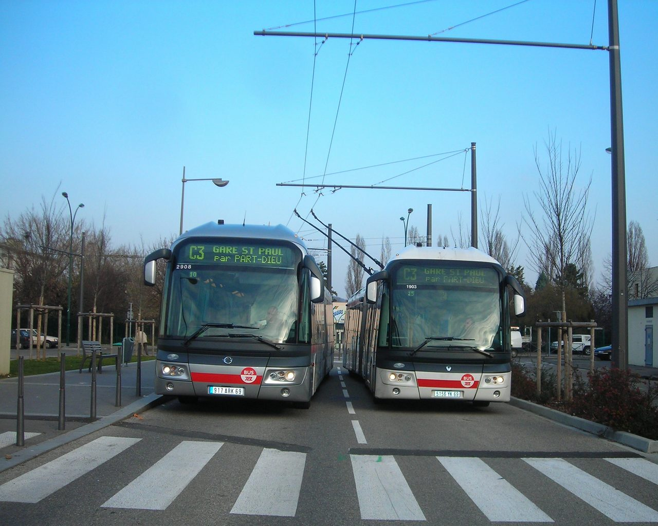 Deux trolleybus articulés Irisbus Cristalis ETB18 du réseau TCL de Lyon se trouvent au terminus Vaulx-en-Velin La Grappinière de la ligne C3. L'un d'eux porte la livrée spécifique aux lignes "C" et l'autre porte la livrée "BUS/TCL" classique.